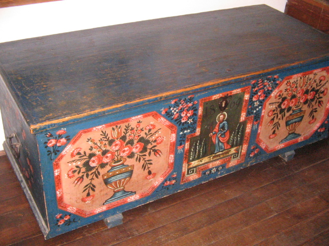 Lizenjakova domačija, Kranjska gora, Slovenija, poslikana skrinja